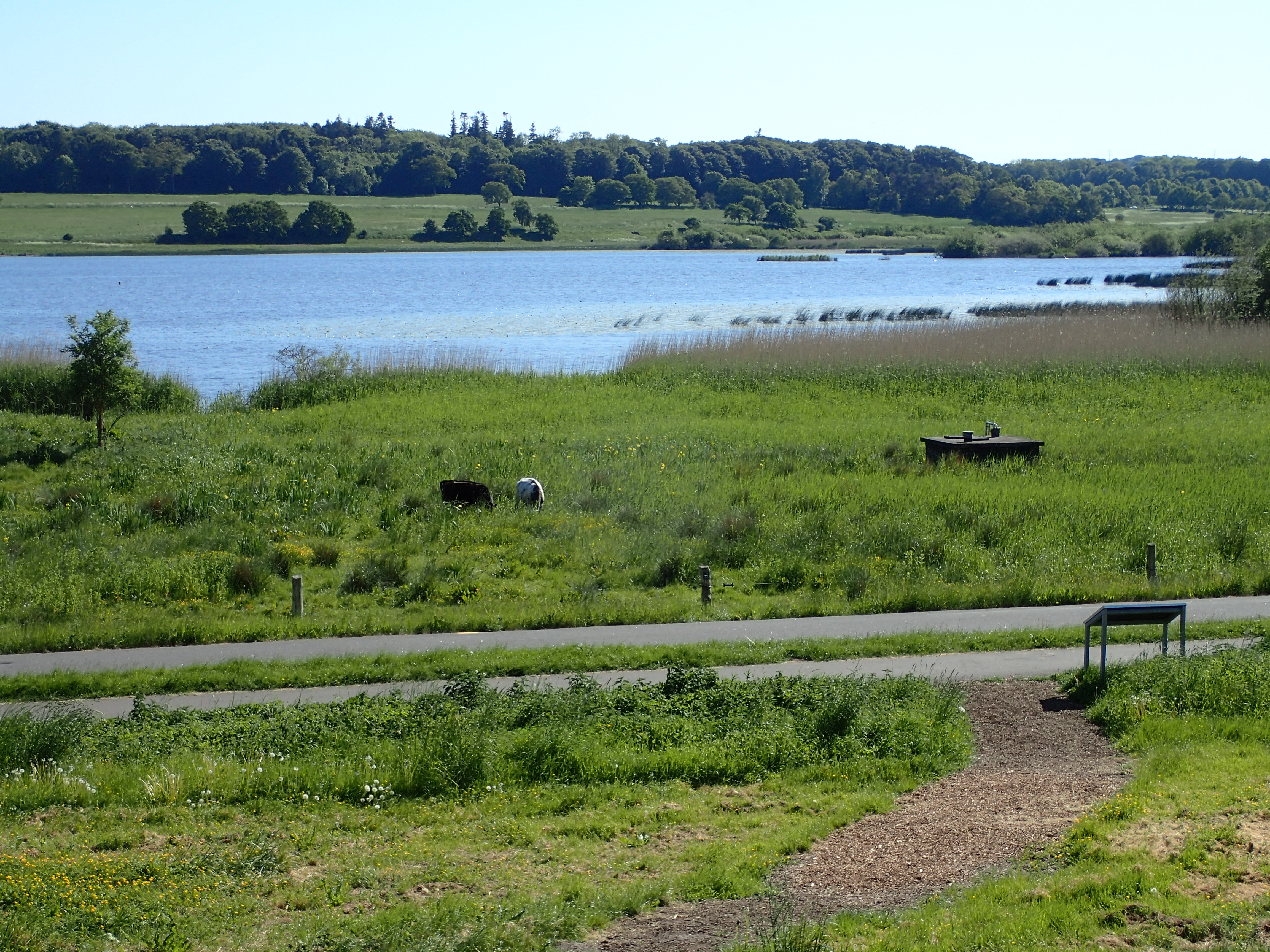 Maj scene fra Brabrand Sø. Ved Brabrand Kirke.